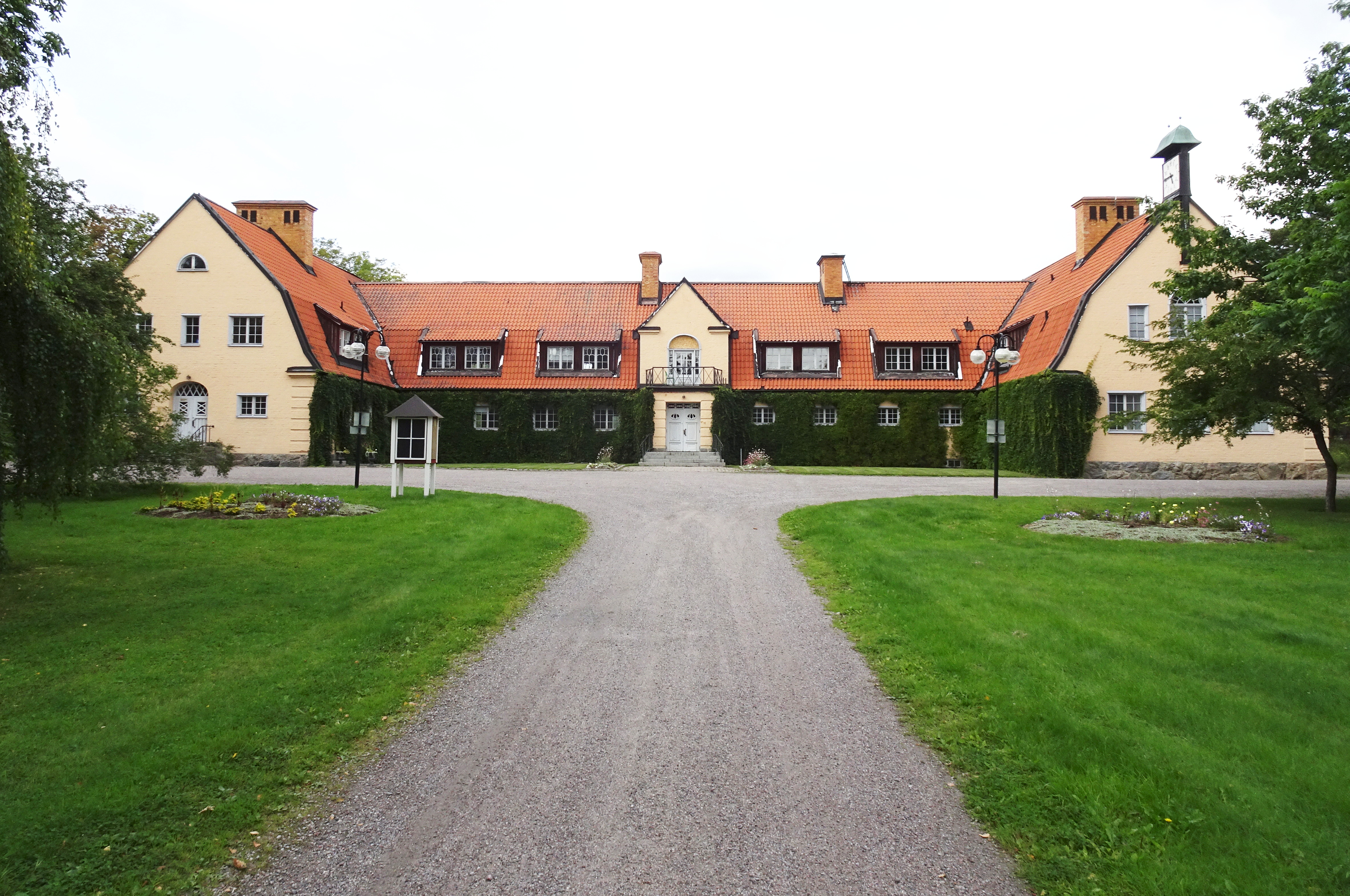 Säbyholms gård, huvudbyggnad